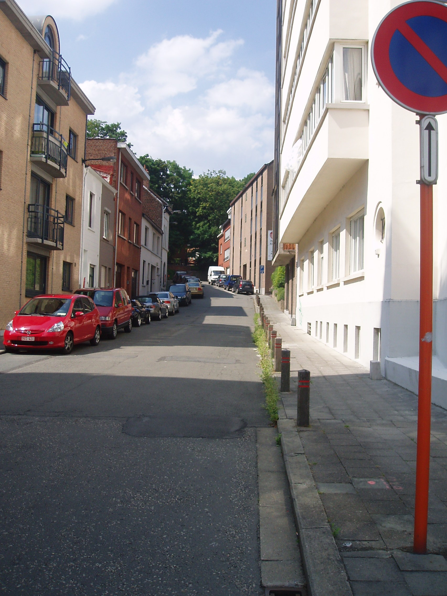 rue du Railway Auderghem Belgium